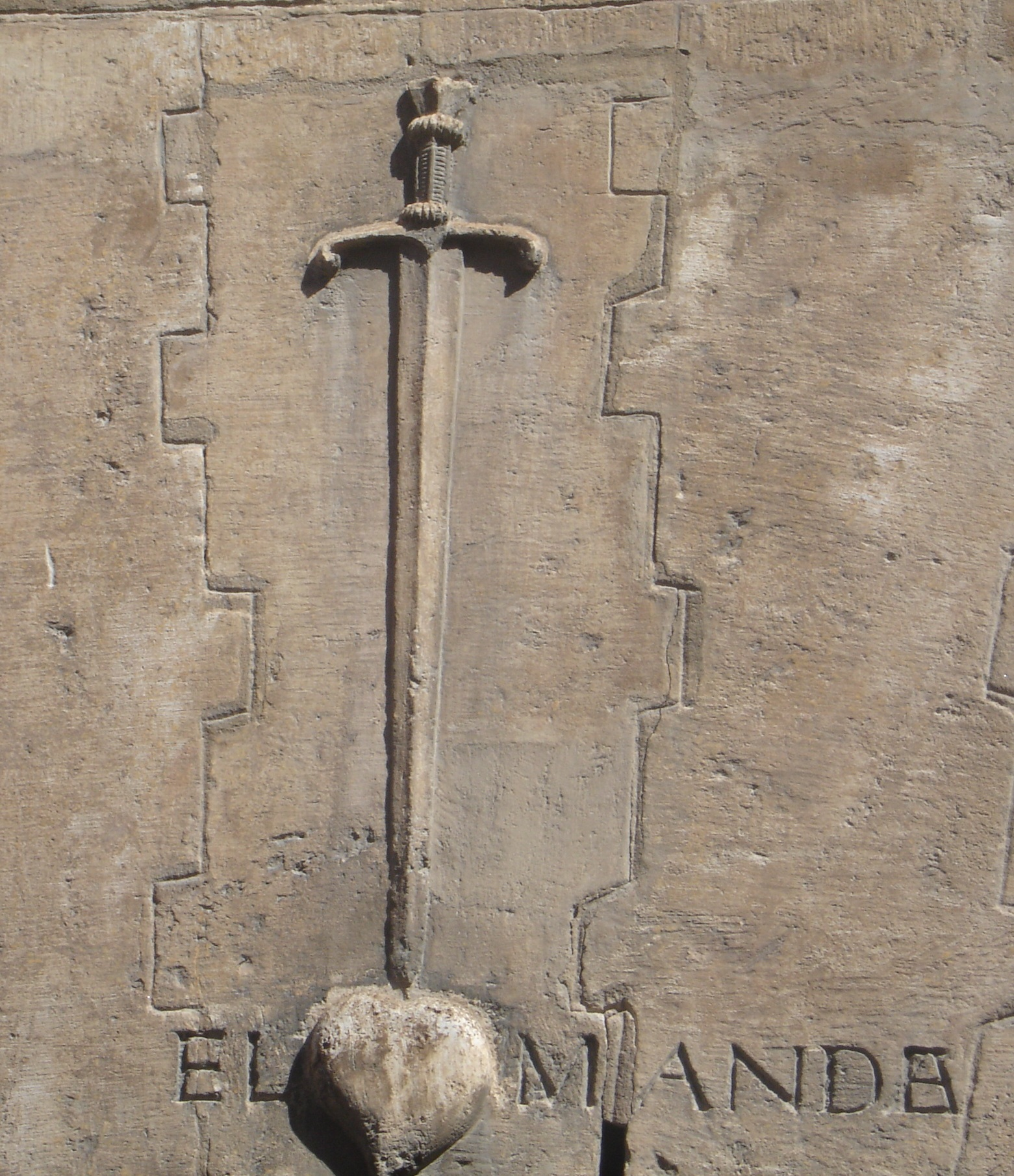 Detalle de la fachada de la Casa de los Tiros, en las que aparece el lema de la casa, el Corazón manda.